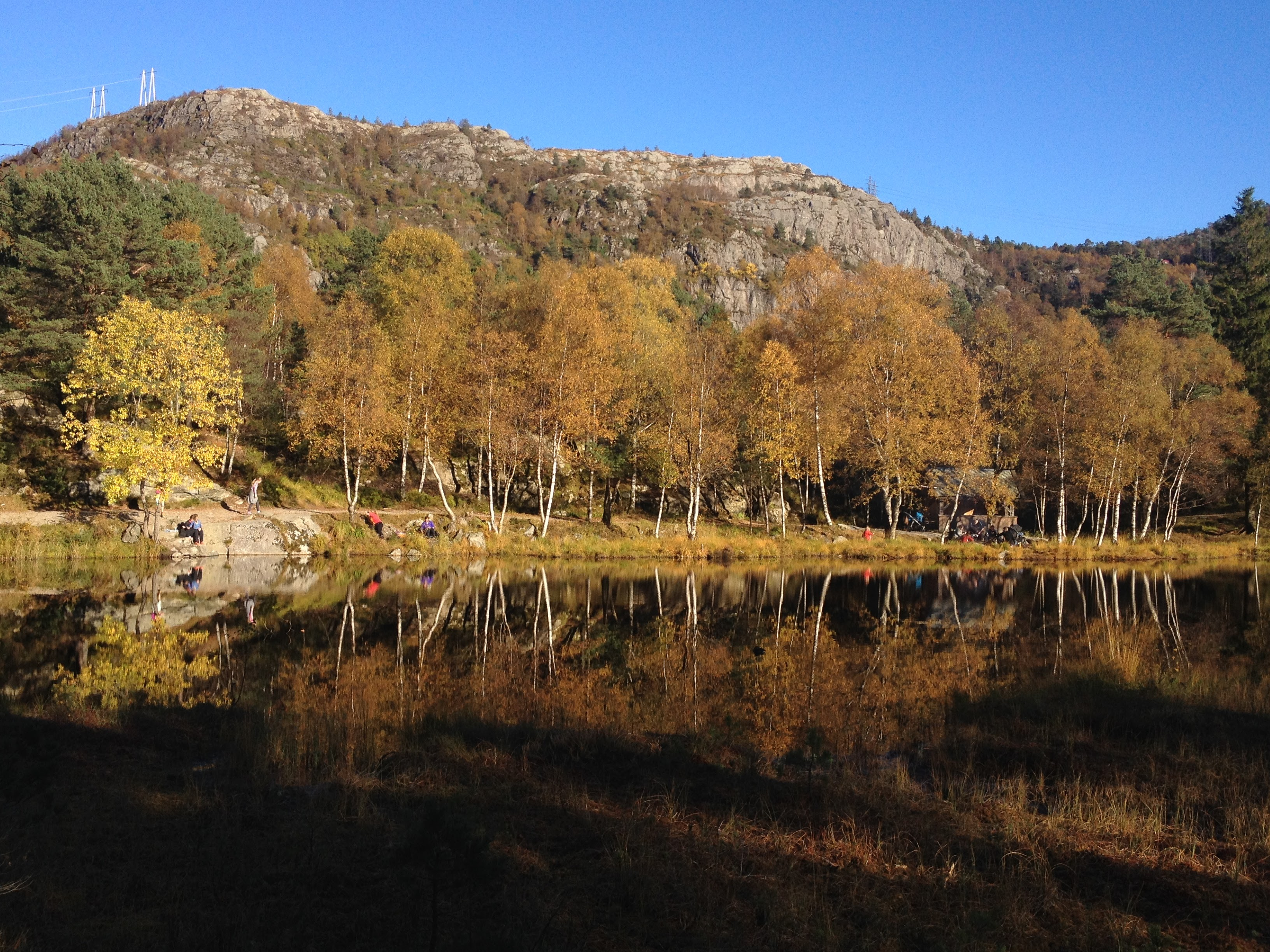 Garpetjernet autumn